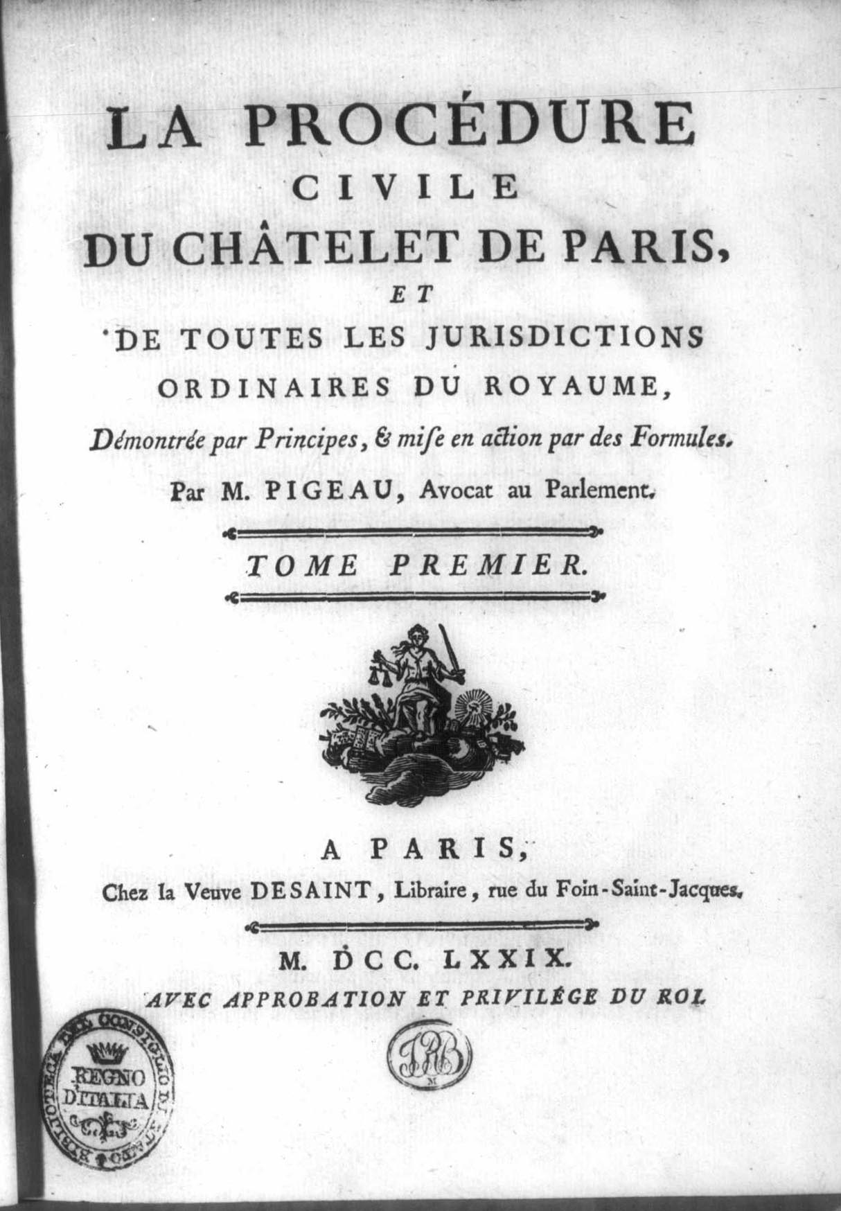 Frontespizio